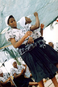 Batucadeiras do Bairro 6 de Maio. Damaia - Lisboa. 1994.